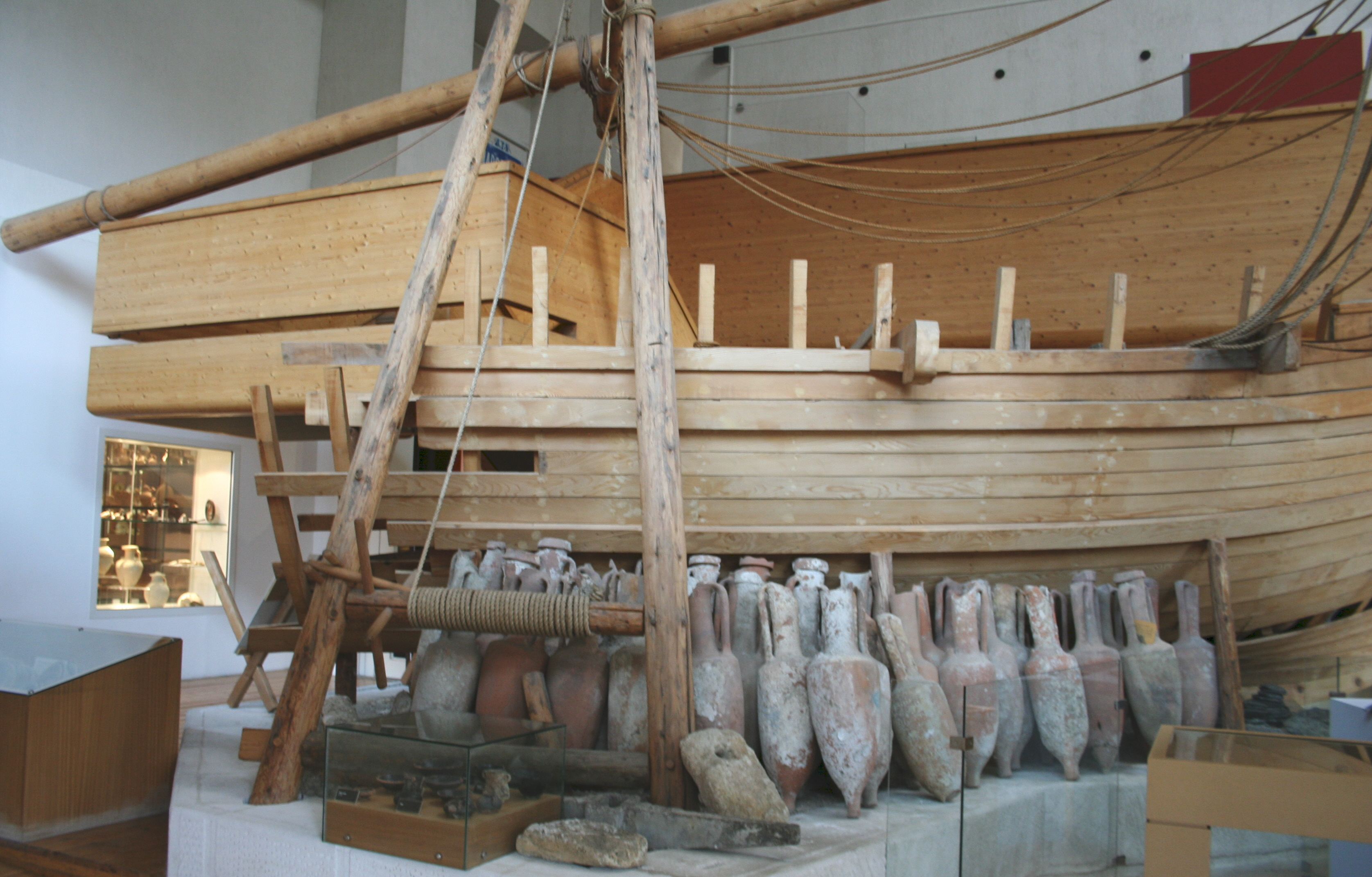 Reconstitution de la construction d'un bateau romain. Cette reconstitution est basée sur le modèle de l'épave des Laurons (anse de Fos), seule épave connue ayant conservé son pont. Cette épave date de la période 160-180 après J.C. Devant sont placées plusieurs amphores. Exposition au musée d'histoire de Marseille du centre Bourse.